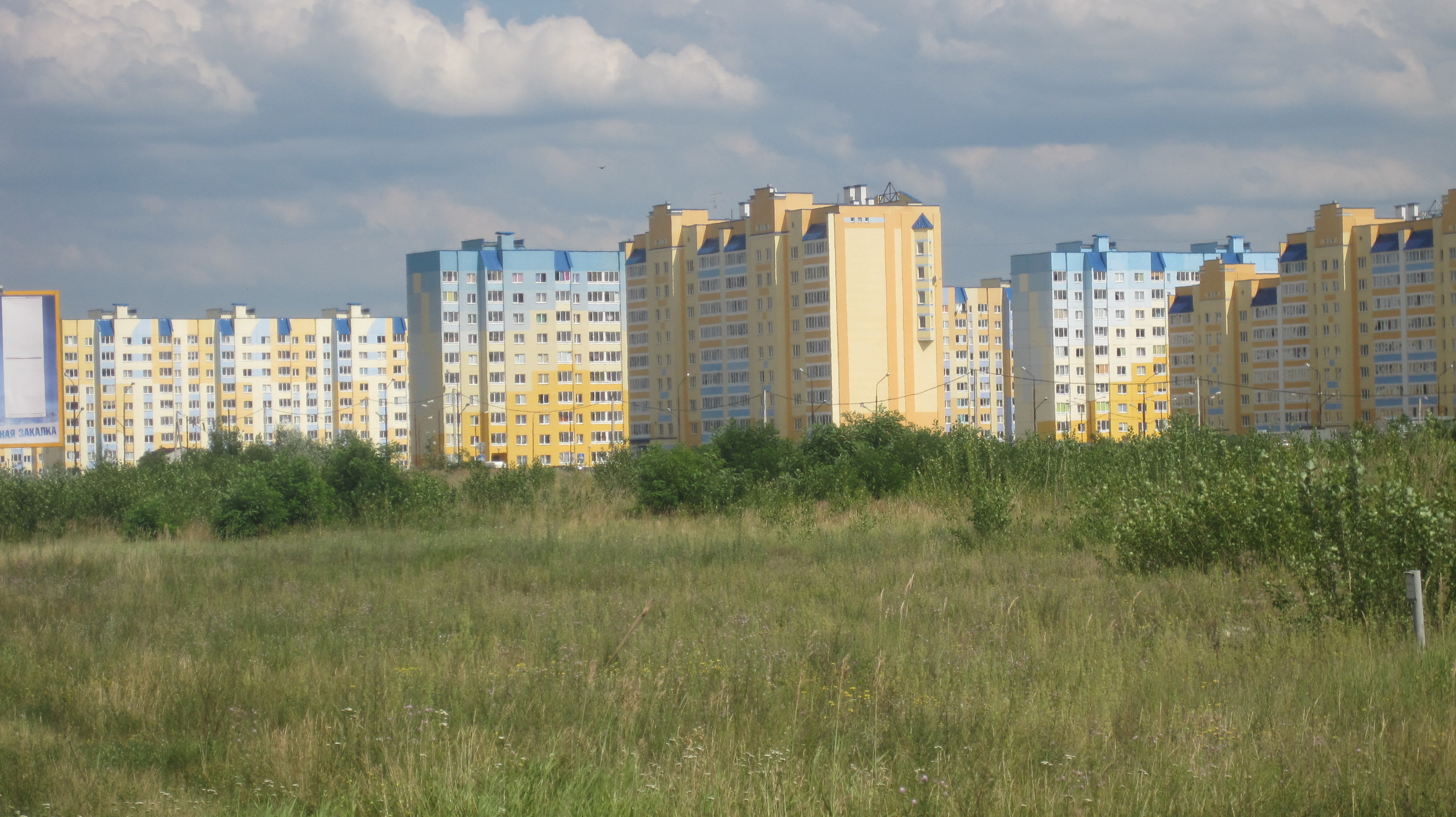 Immeubles récents près de la ville de Brest Biélorussie en 2012